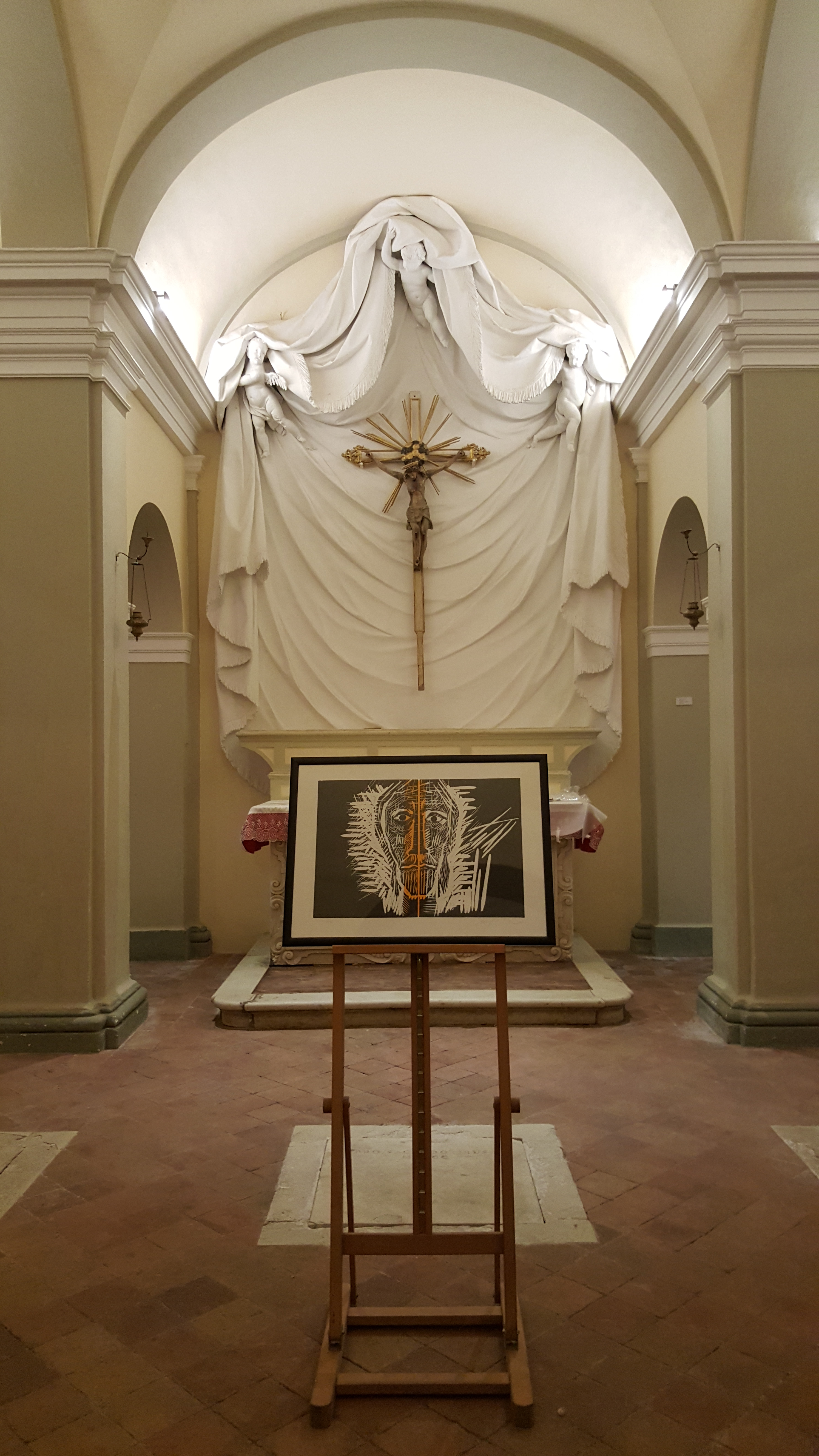 Museo di Saludecio e del Beato Amato This is a photo of a monument which is part of cultural heritage of Italy.